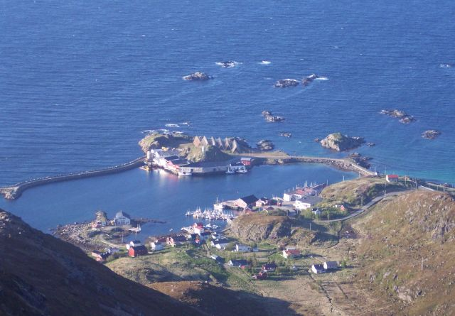 Stø von aus den Bergen fotografiert